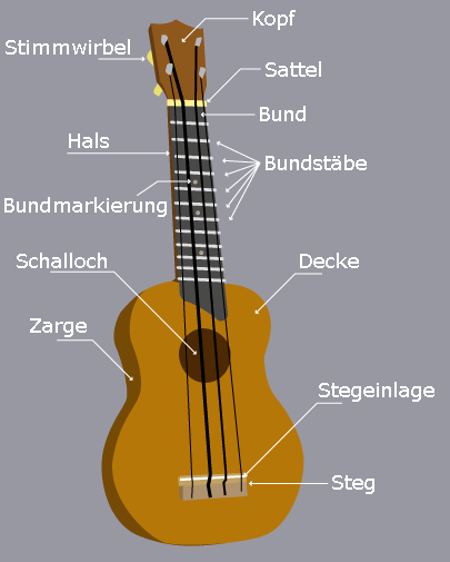 Ukulele Beschriftung